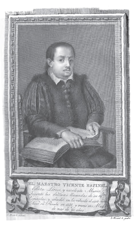 Retrato de Vicente Espinel.